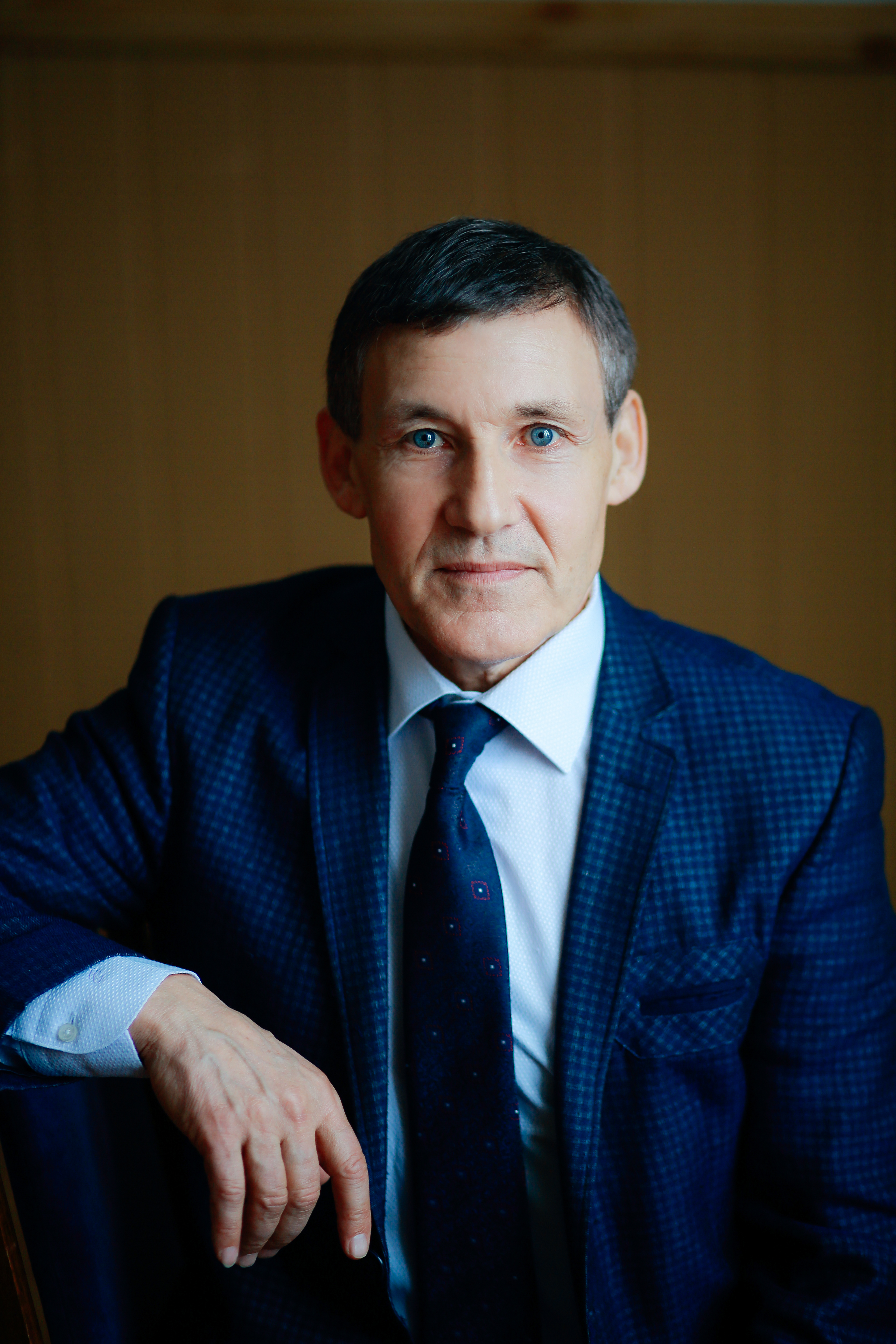 Заслуженный тренер России Анисимов Николай Иванович. Февраль 2019 года, Чебоксары.